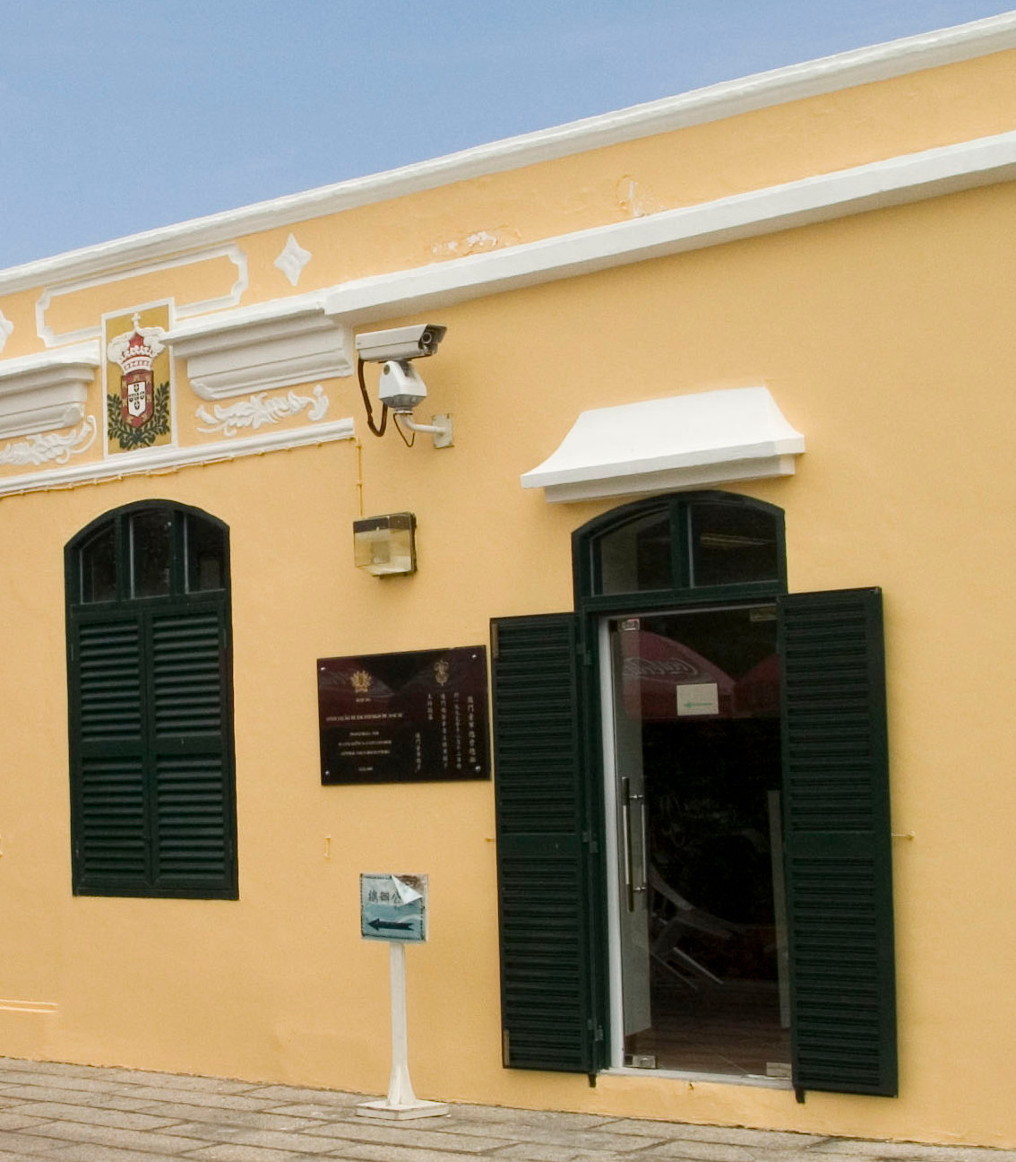 Associação de Escoteiros de Macau